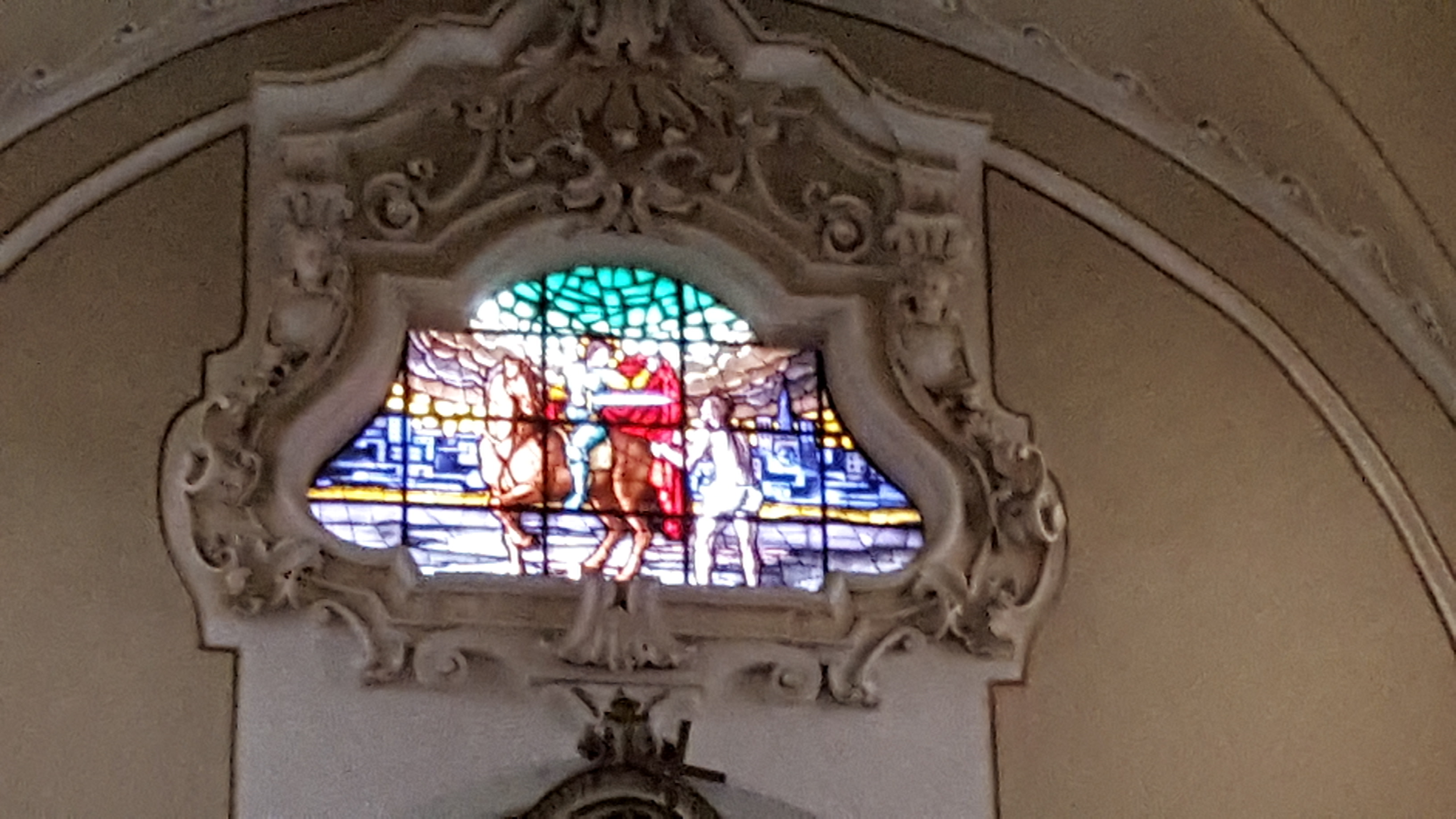 Particolare della Vetrata - San Martino, Martina franca